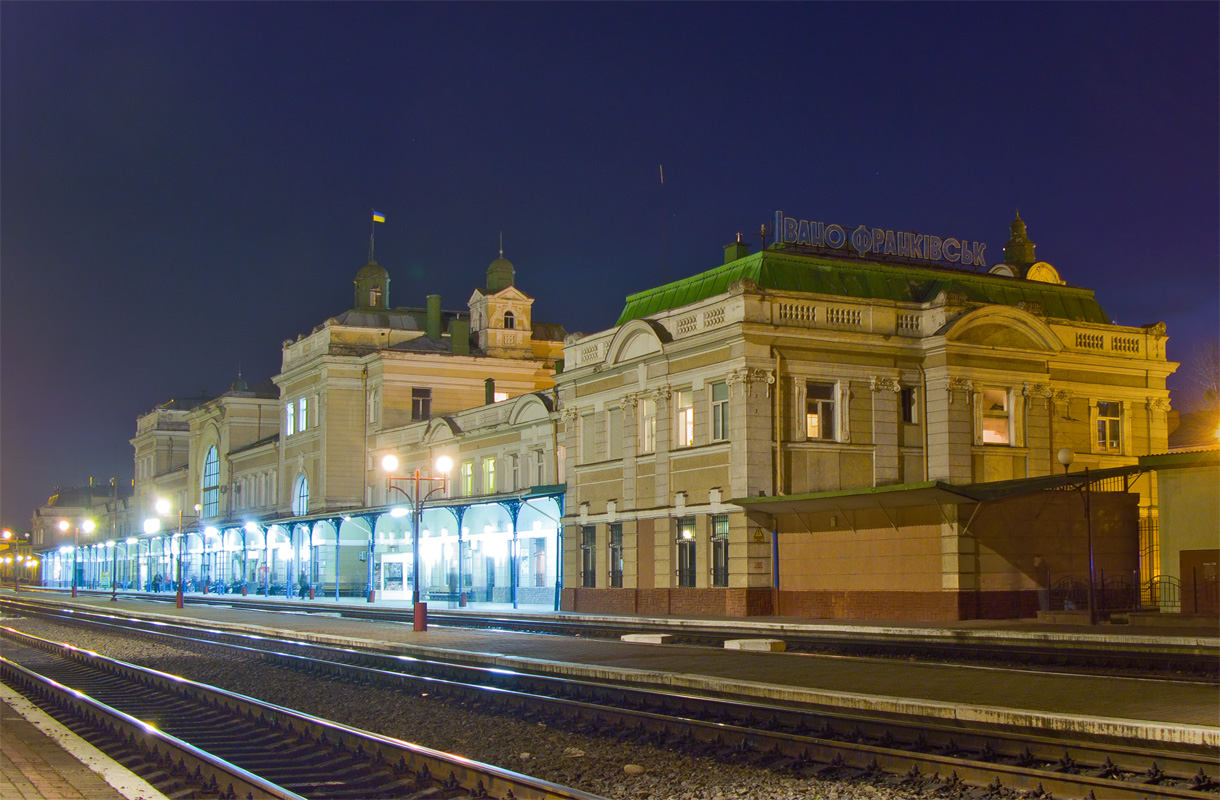 Вокзал станції Івано-Франківськ